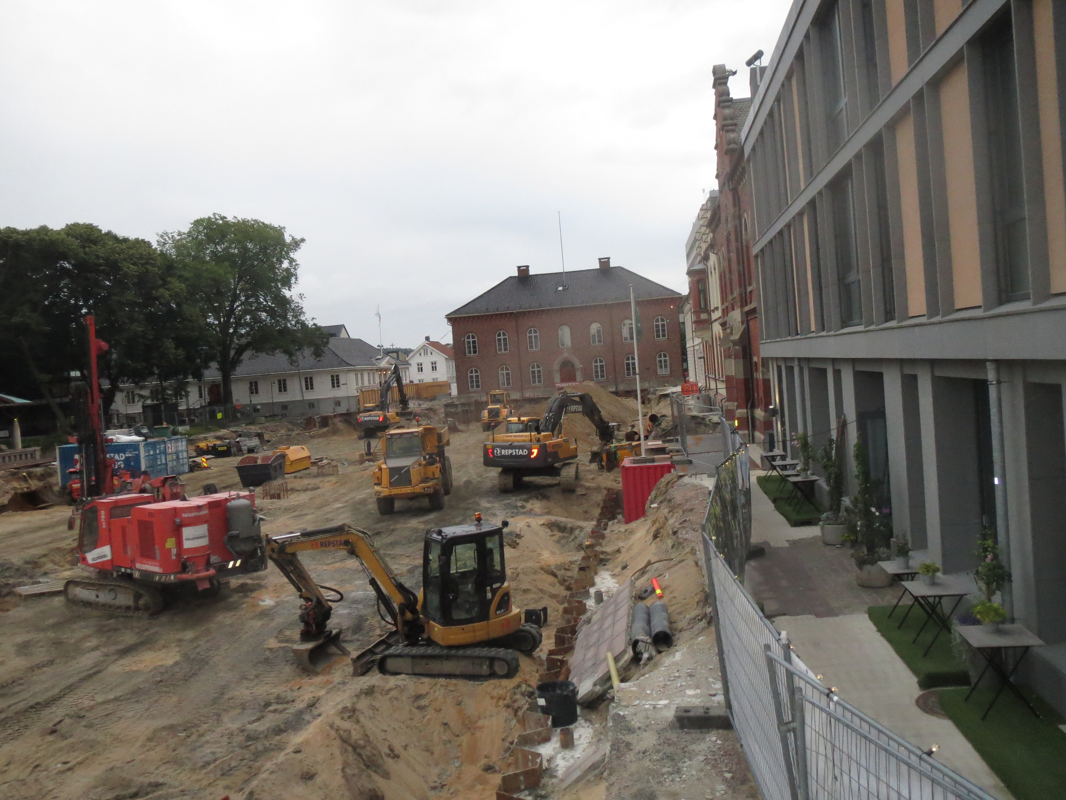 Øvre torv i Kristiansand under anleggene for underjordisk parkeringshus, juli 2016, bilde 2